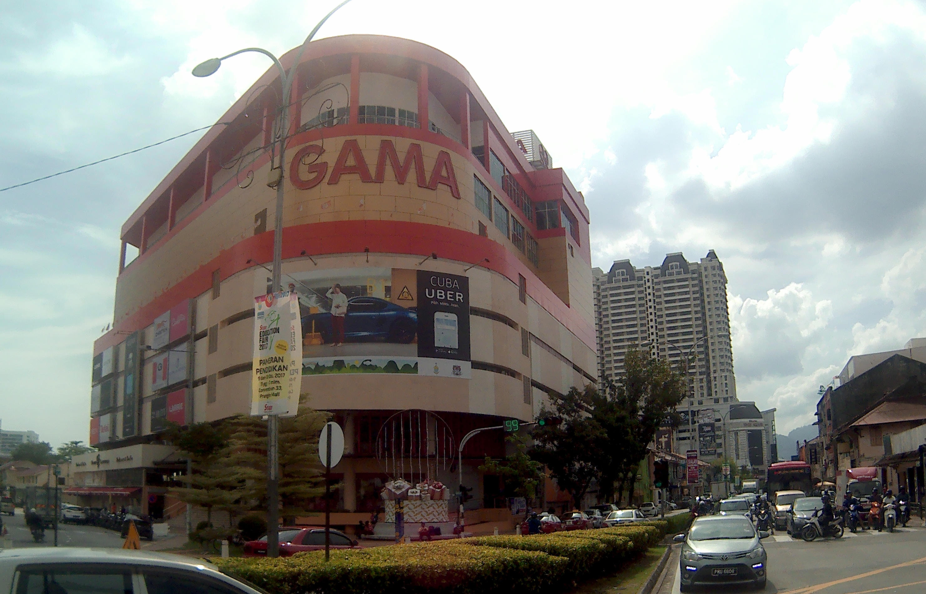 槟城加马广场，一间旧式百货